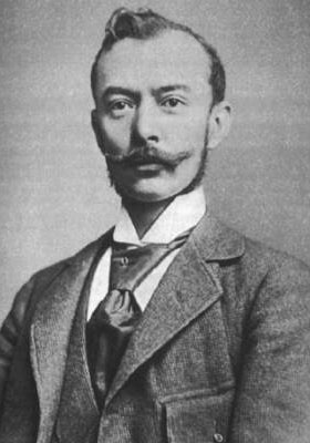 Tömörkény István magyar író, újságíró, néprajzkutató, régész, múzeum- és könyvtárigazgató.